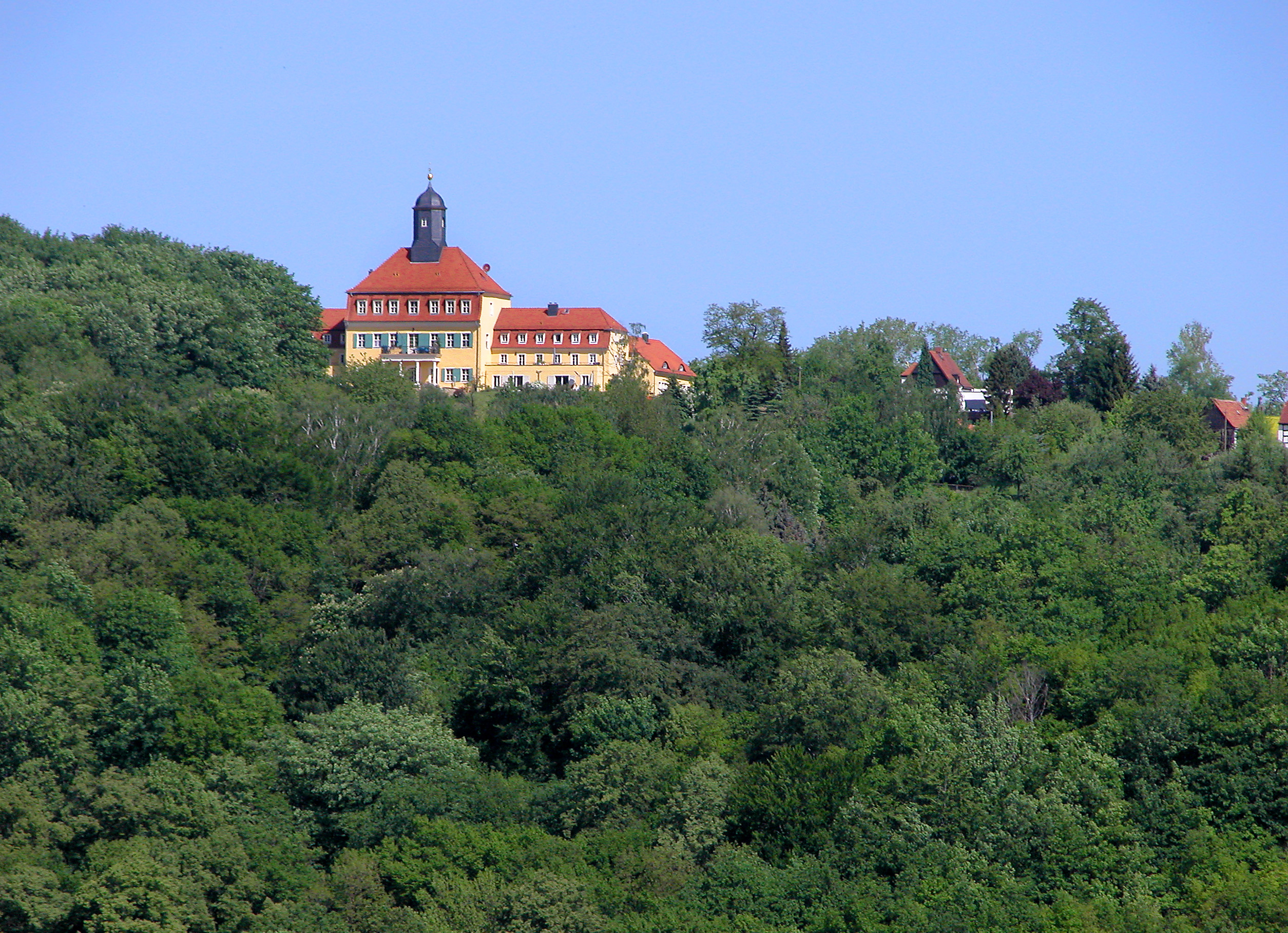 22.05.2006 01705 Freital: Blick von Süden nach Pesterwitz-Neuniptsch zum Jochhöhschlößchen (GMP: 51.019770,13.663107). Es wurde unter Carl Albrecht von Nimptsch, dem damaligen Besitzer des Ritterguts Pesterwitz, in den Jahren 1795 bis 1797 als Weinberghaus und Sommerschlößchen errichtet. In der DDR war es ein Altersheim. 2001 wurde das Anwesen an die VENTAR Immobilien AG verkauft, die 2003 Eigentumswohnungen einrichtete. [DSCN10108.TIF]20060522080.JPG(c)Blobelt